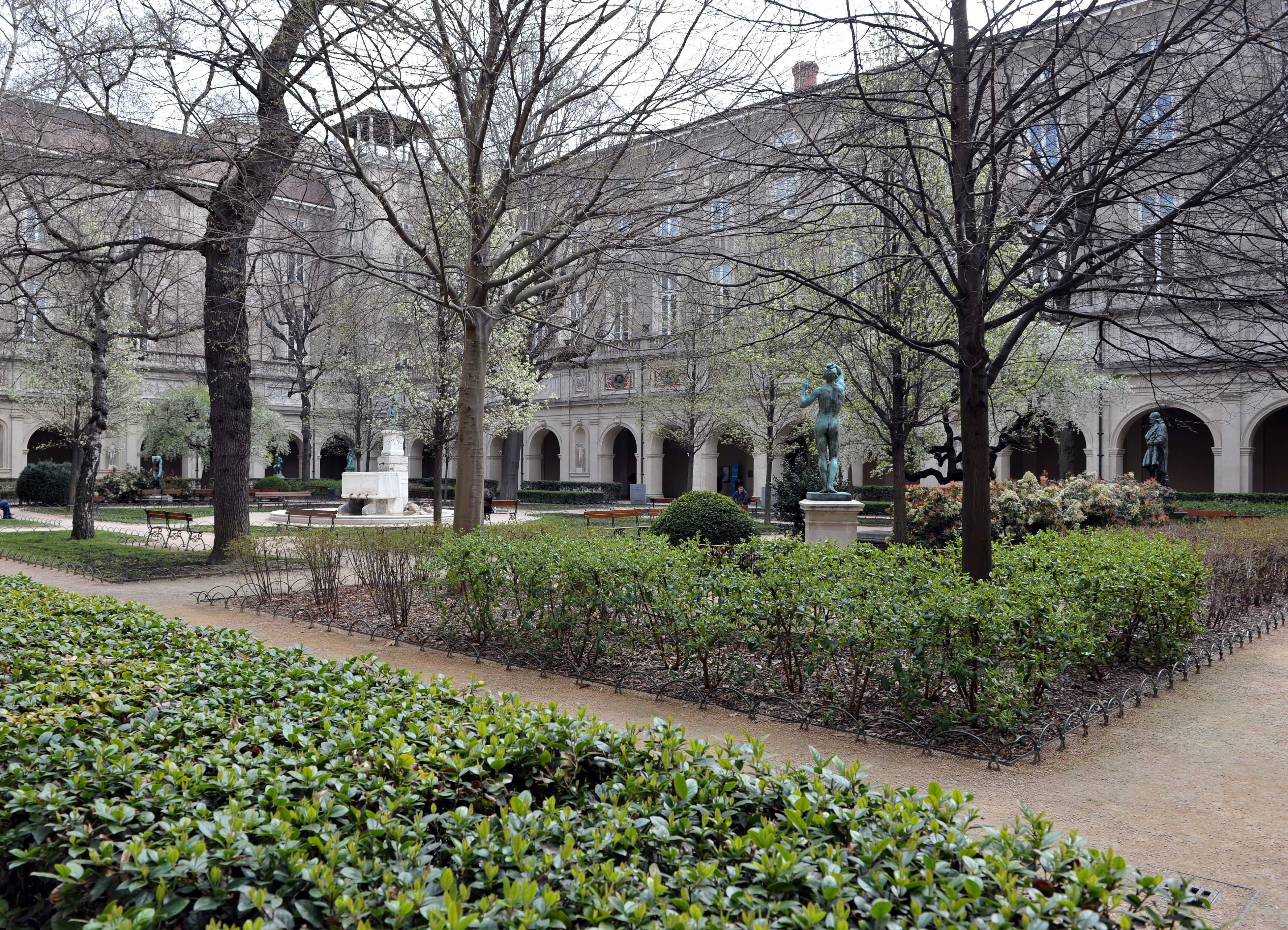 This building is en partie classé, en partie inscrit au titre des Monuments Historiques. .